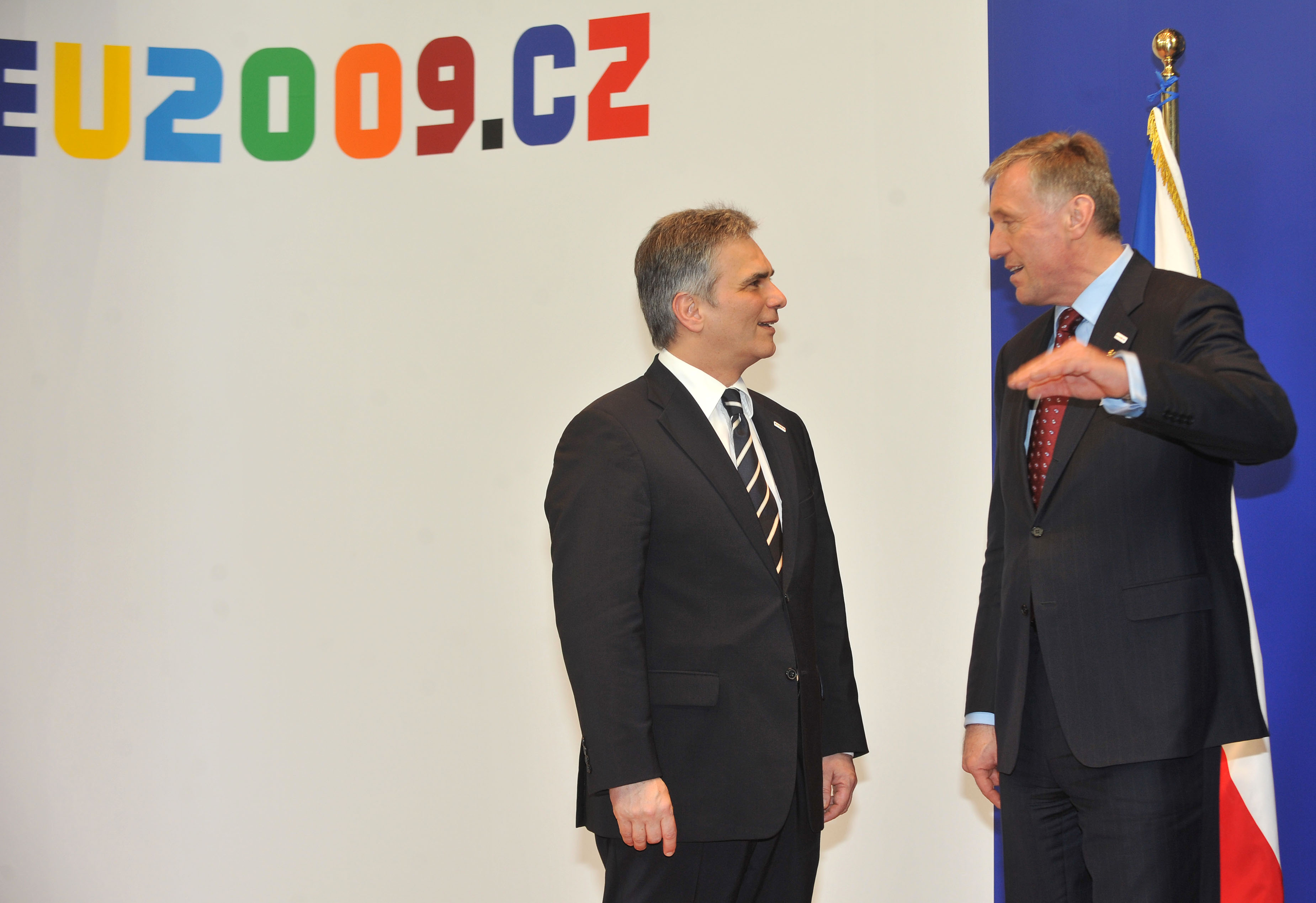 Sonntag, den 1. März 2009 fand in Brüssel, Belgien unter tschechischem Vorsitz eine Sondersitzung des Europäischen Rates der EU-Staats- und Regierungschefs zur Wirtschaftskrise statt. Im Bild Österreichs Bundeskanzler Werner Faymann (L) mit dem Ministerpräsident der Tschechischen Republik und amtierenden EU-Ratsvorsitzenden, Mirek Topolanek (R). Quelle: BKA/HOPI-MEDIA